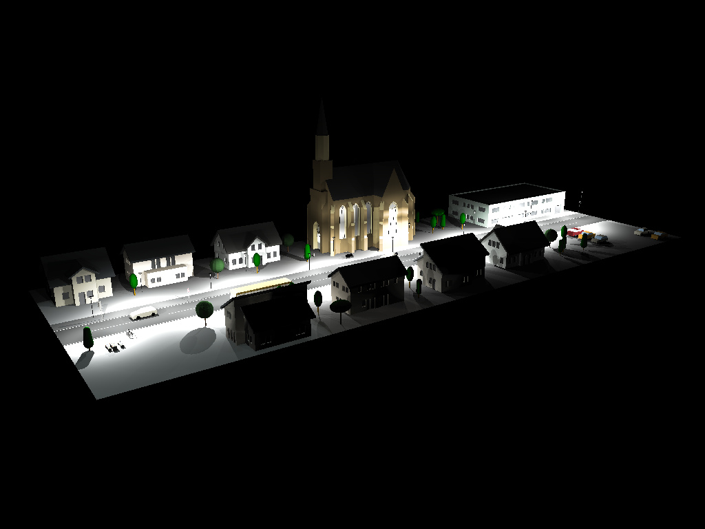 Mit Hilfe der Software DIALux erstelltes und mit POV-Ray gerendertes Beleuchtungsszenario (Stadtstraße)